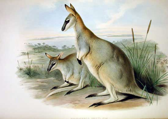 Macropus greyi (orig. Halmaturus greyi)